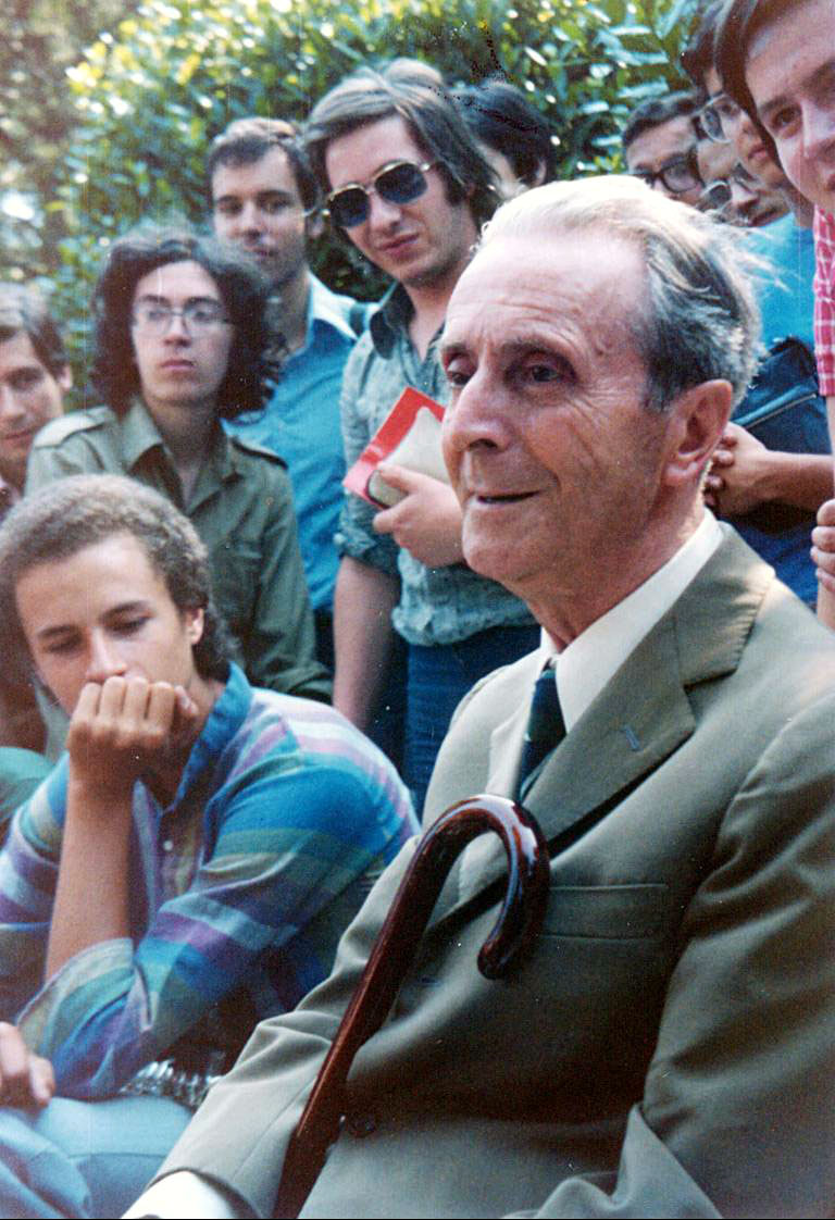 Igino Giordani, escritor, jornalista e político italiano.